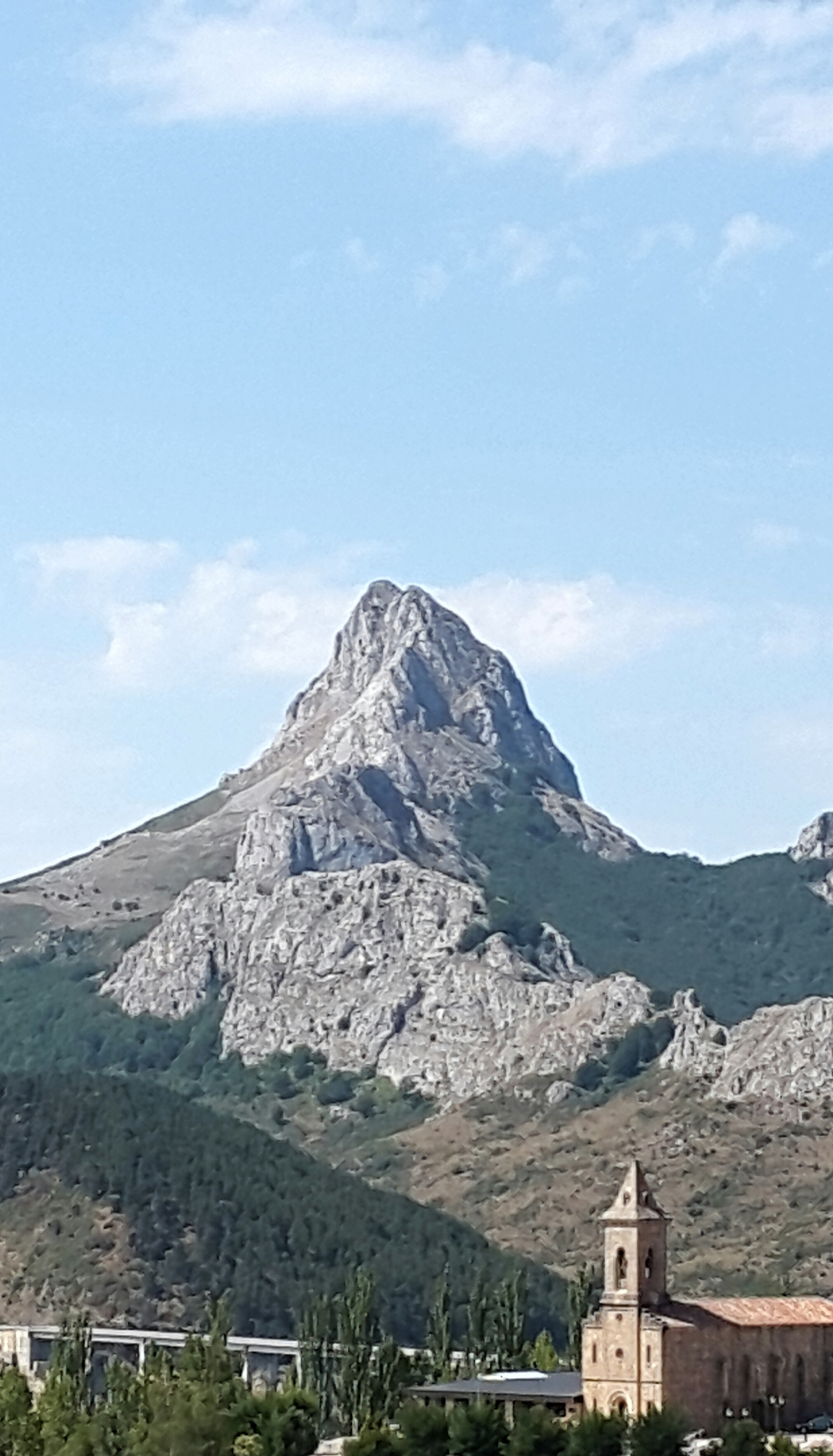 El Gilbo desde Riaño